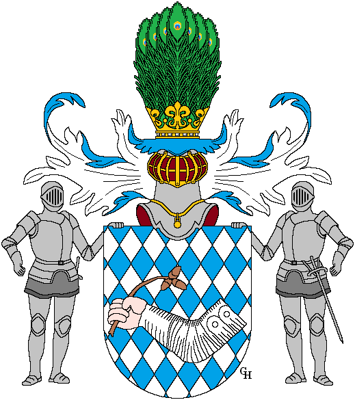 Wappen des k.u.k. Feldmarschall-Leutnants Johann Nepomuk Freiherr von Prochaska-Coronini (1760–1823), verliehen anlässlich seiner Erhebung in den österreichischen Freiherrenstand 1820. Zeichnung von Gerd Hruška ( Für weitere Informationen zu dieser Standeserhebung siehe (